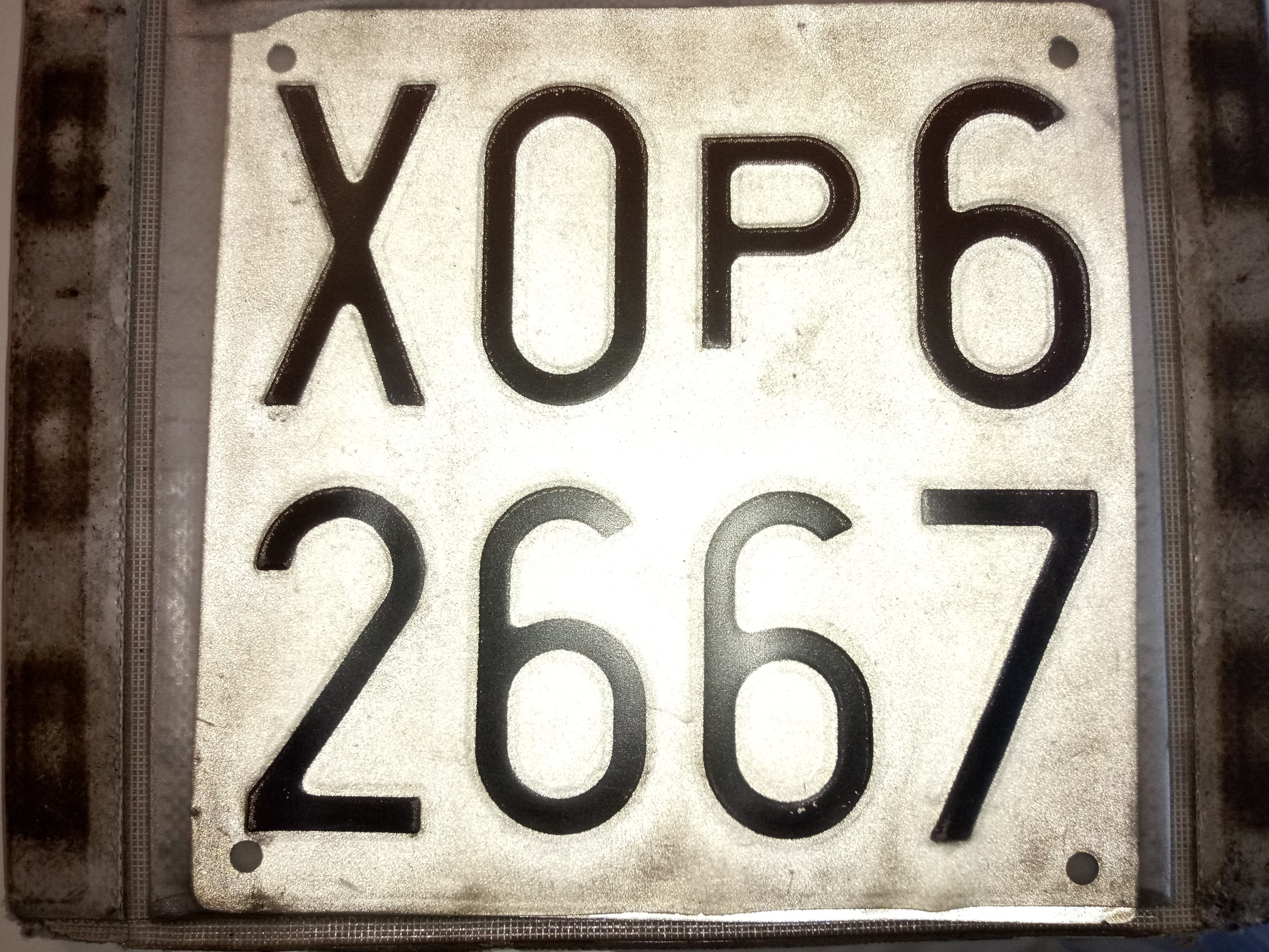 La foto rappresenta una targa prova italiana con formato standard (quadrato) in uso dal 2004 per ogni categoria di veicolo e con validità massima un anno.